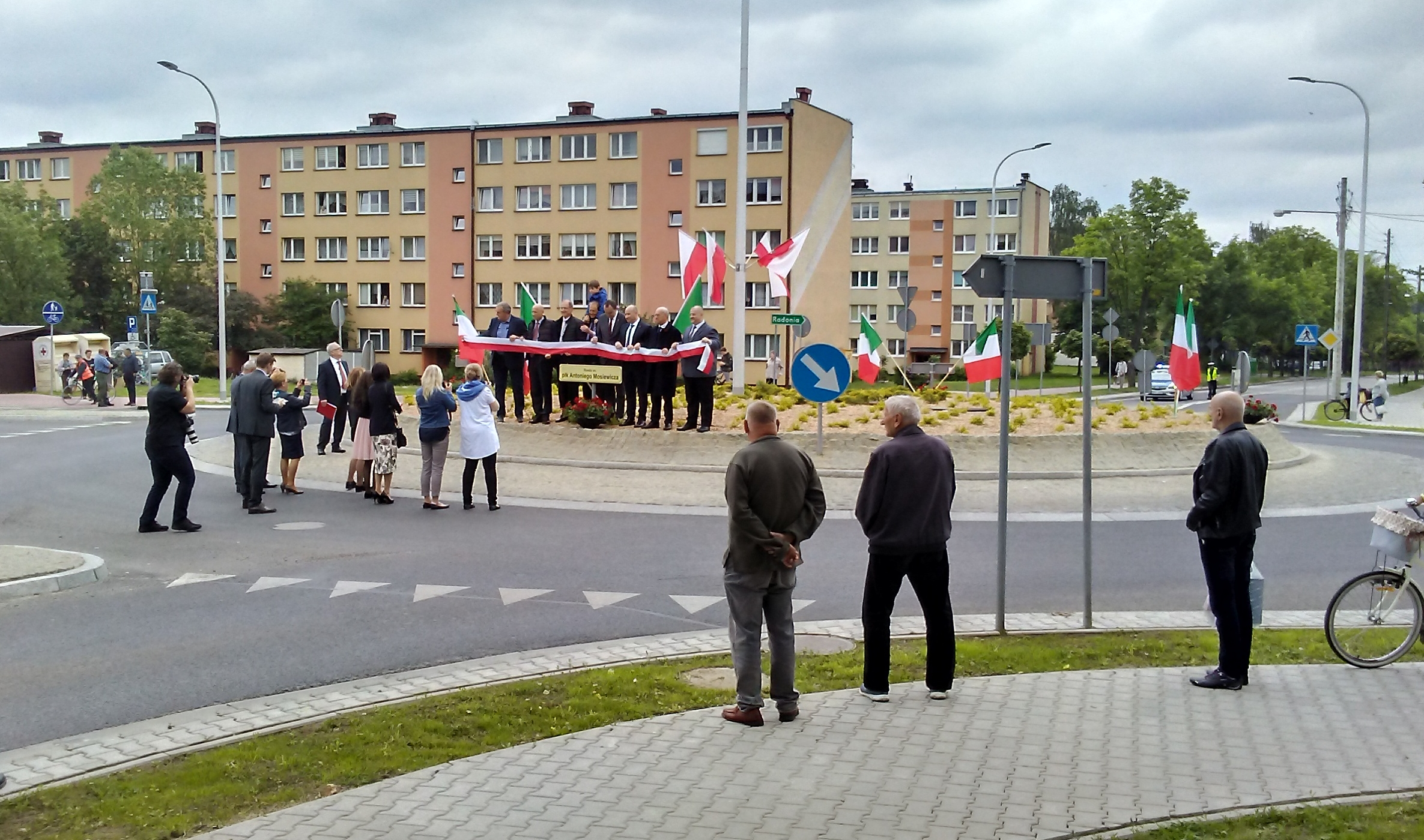 Krótka ceremonia otwarcia ronda plk. Hojnowkiego w Tomaszowie Mazowieckim. Samo oddanie do użytku odbyło się kilka tygodni wcześniej. Ceremonia trwała niespełna 10 minut po czym przywrócono ruch.